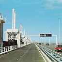 voorbeeld gif dithering, eigen foto, eigen werk.